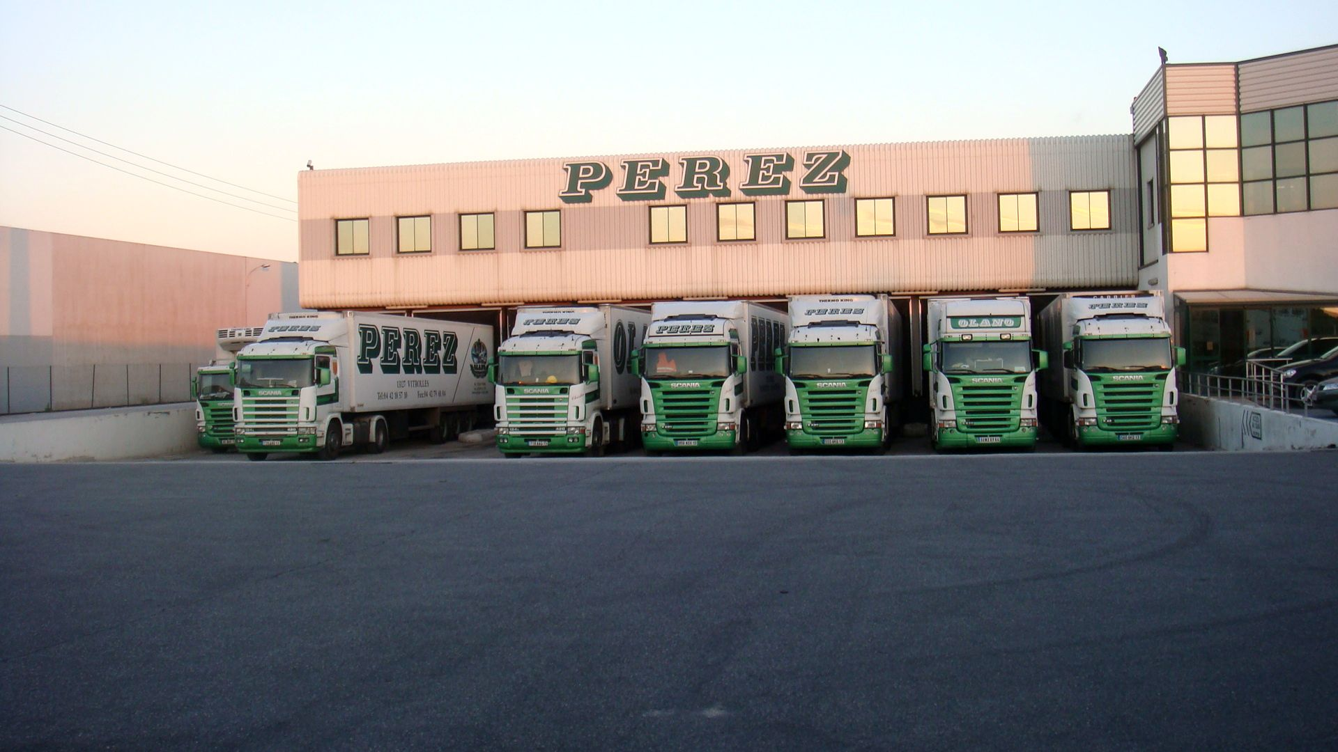 Des camions à quai chez Olano Perez Vitrolles